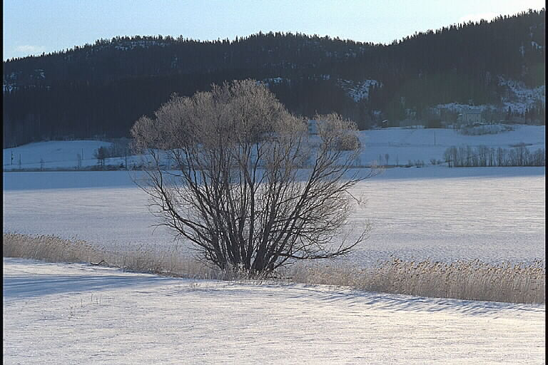 Ingår i Höga Kustens världsarvsområde. Motiv: Östansjö Nyckelord: Vintermotiv, Världsarv Kategori: SkogslandskapIngår i Höga Kustens världsarvsområde.